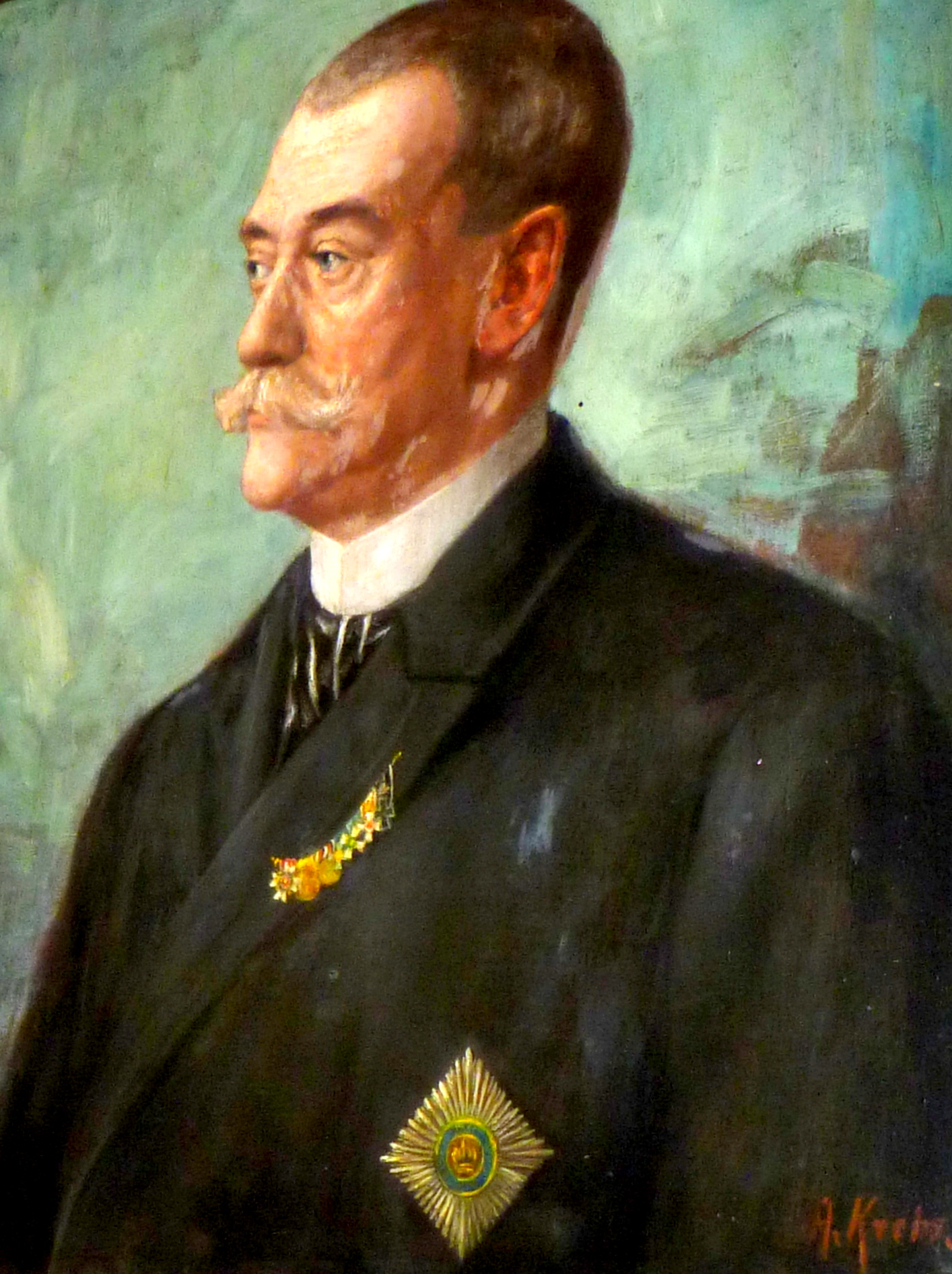 Fotografie des Porträtgemäldes des Aachener Oberbürgermeisters Ludwig von Weise; Gemälde von A. Krebs im Aachener Rathaus